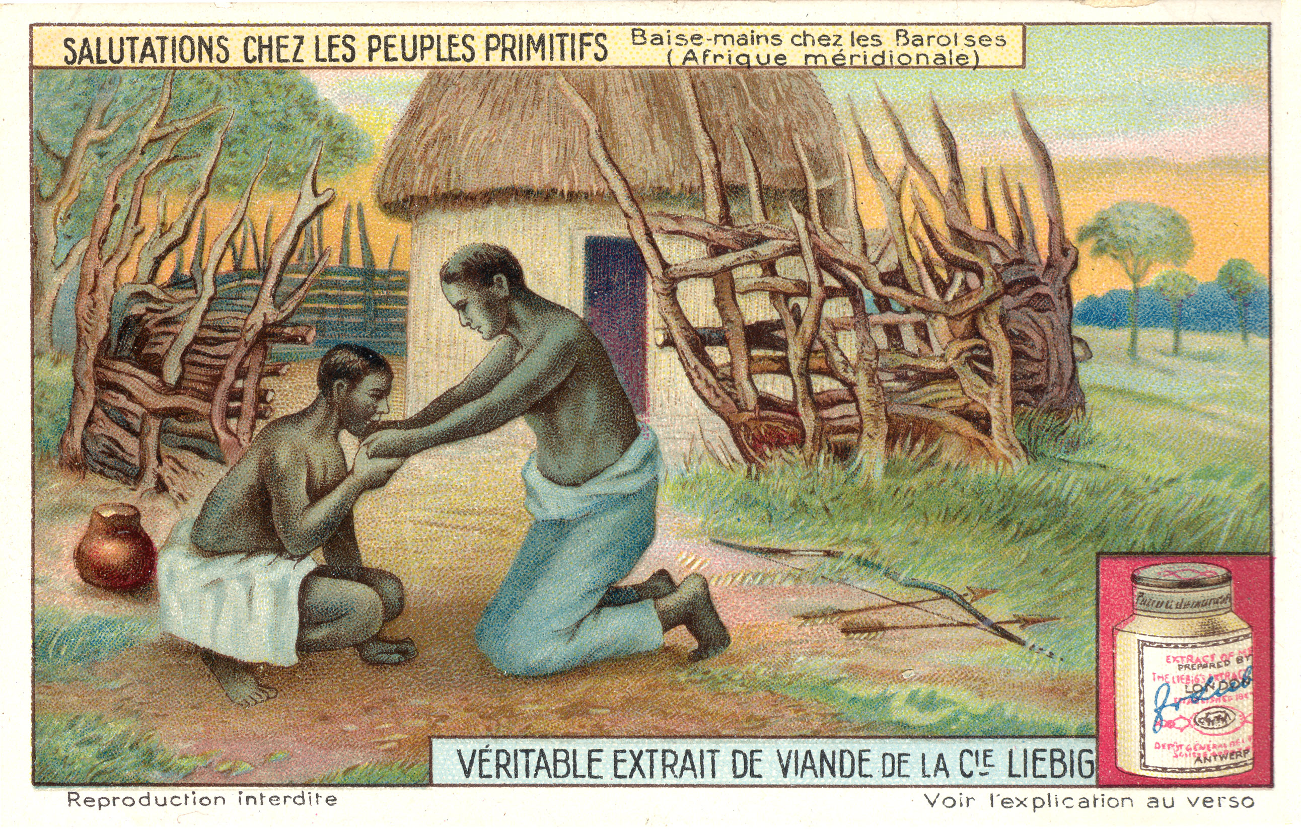 salutation amongst barotse people